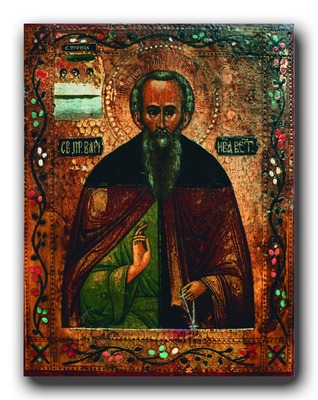 Икона преподобного Варнавы Ветлужского